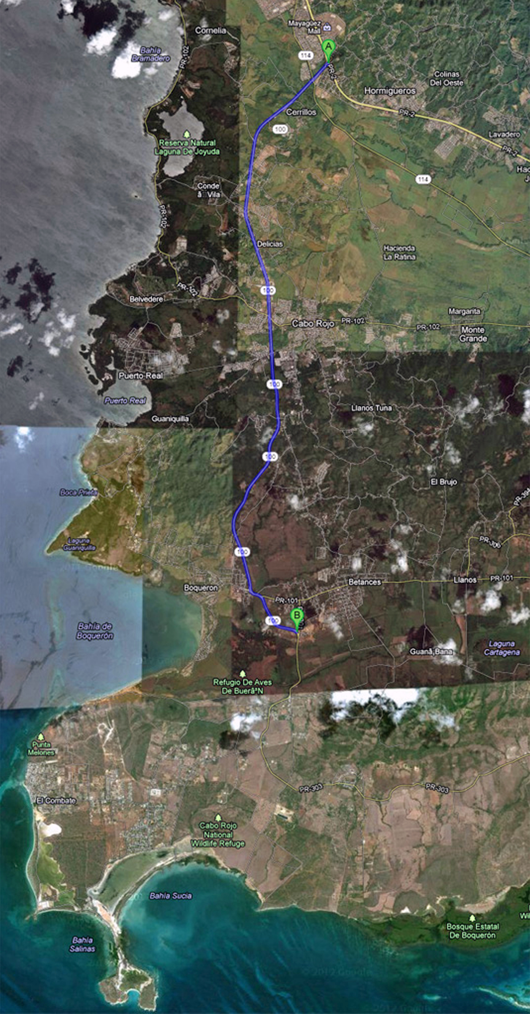 Trazado de la PR-100 a través de la ciudad.